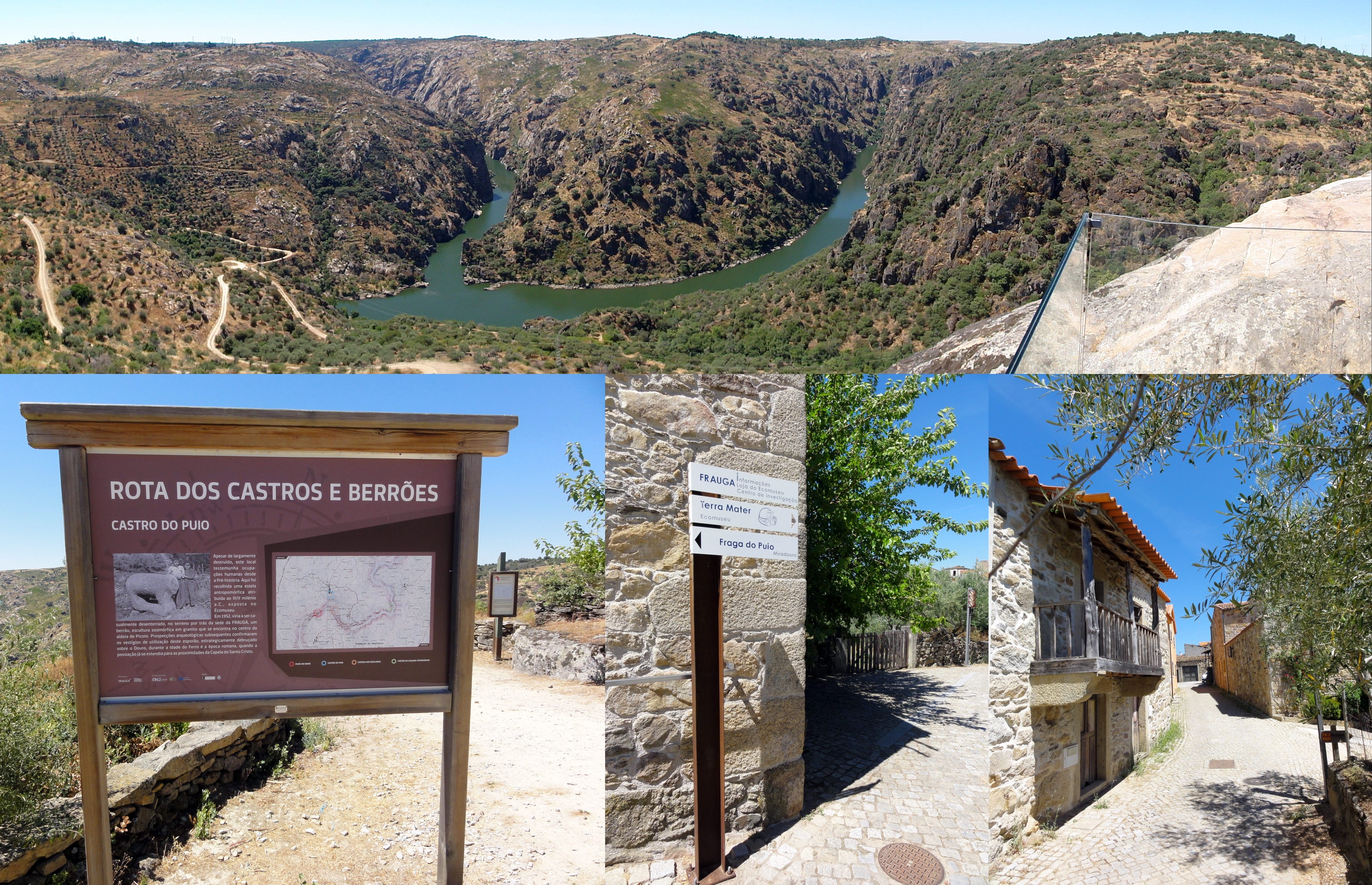 Fraga do Puio (em mirandês Peinha de L Puio) Rio Douro Aldeia de Picote, Parque Natural do Douro Internacional, Miranda do Douro, Portugal Altitude: 610M GPS: N41º23´50.80” W6º22´3.06